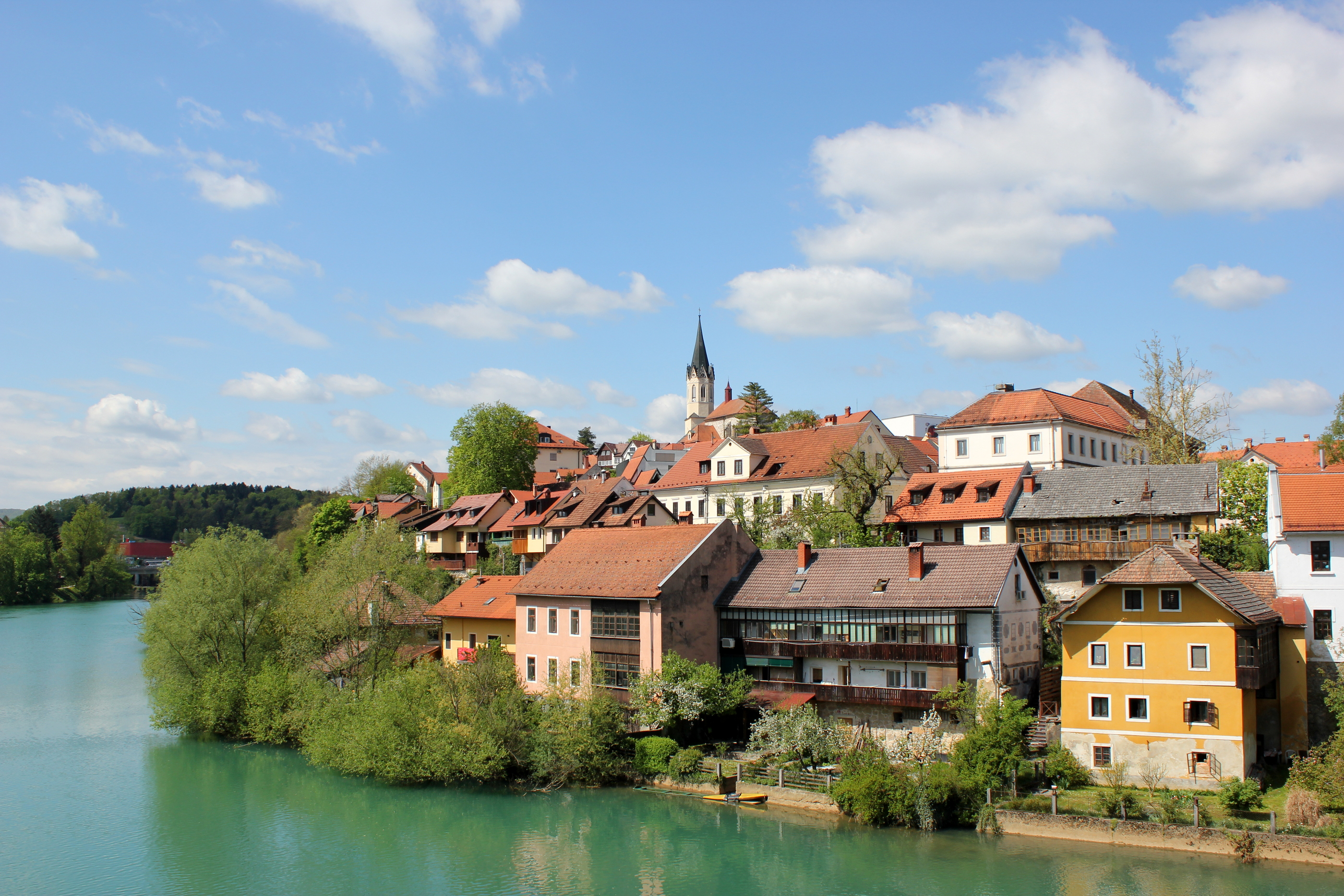 Blick über die Krka auf Novo mesto, Slowenien.